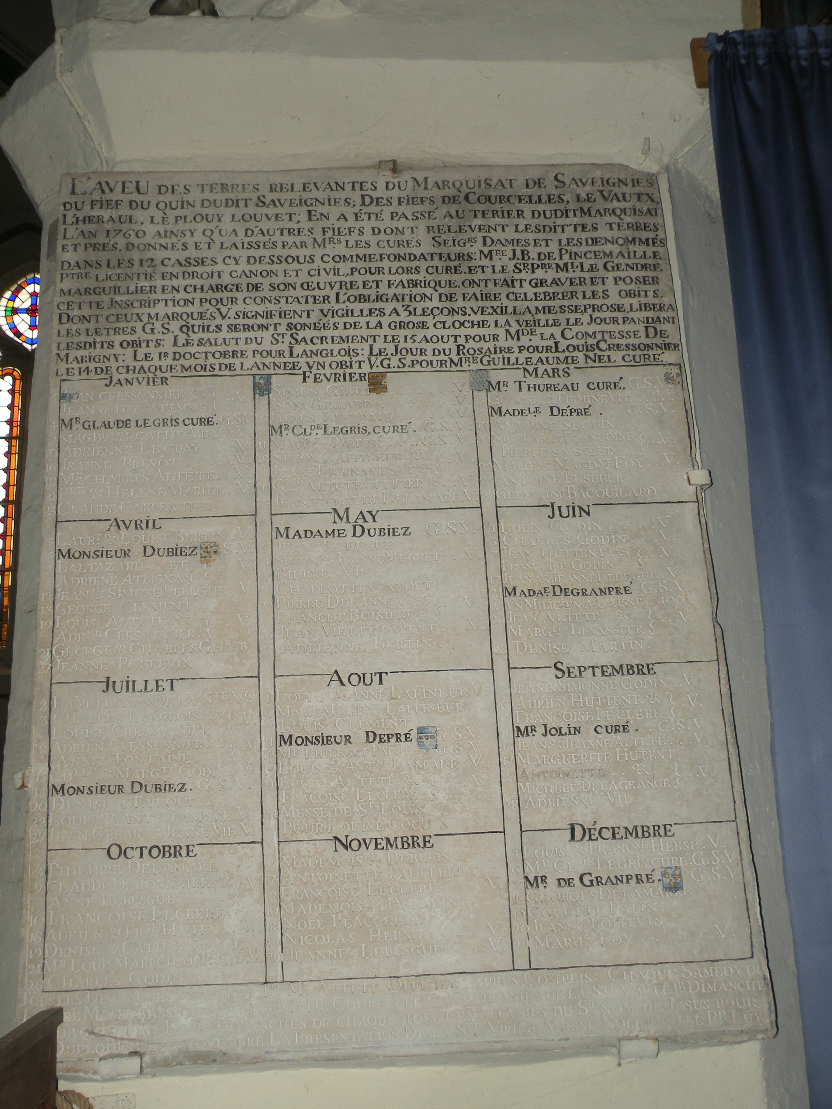 Intérieur de l'église Saint-Rémi de Savignies : obituaire